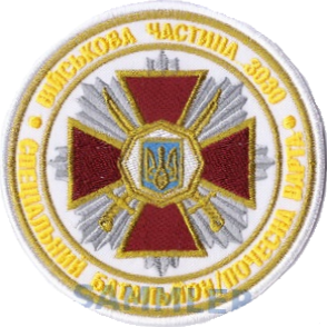 Нарукавний знак, спеціальний батальйон почесної варти НГУ